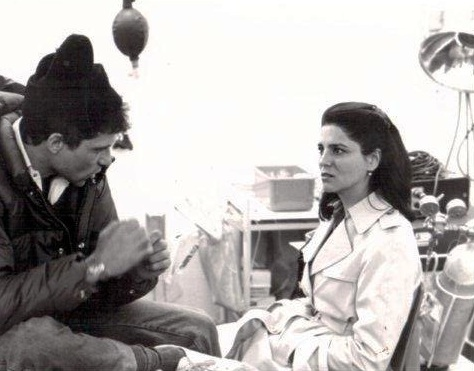 שלח ויונה אליאן מרץ 1982 החורף האחרון צילום יוני המנחם